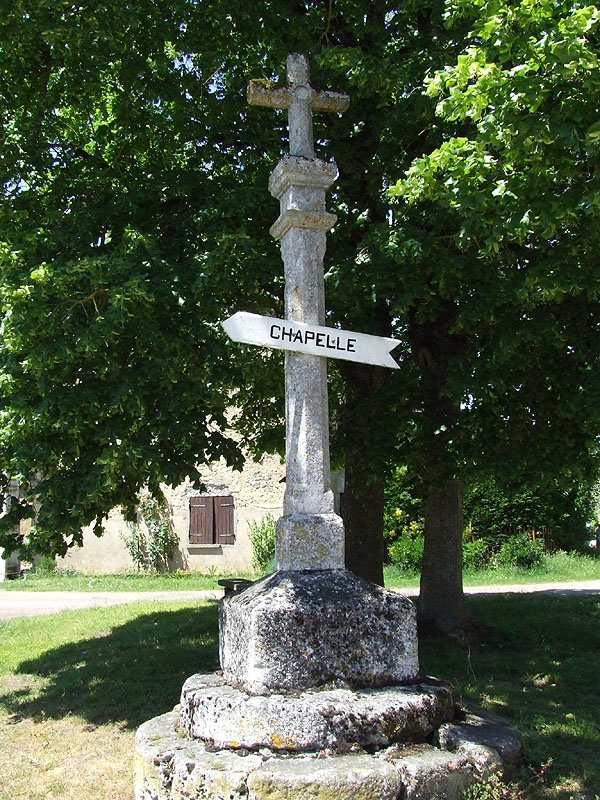 Calvaire sur la place principale du lieu-dit Chevigny (commune d'Étais-la-Sauvin)